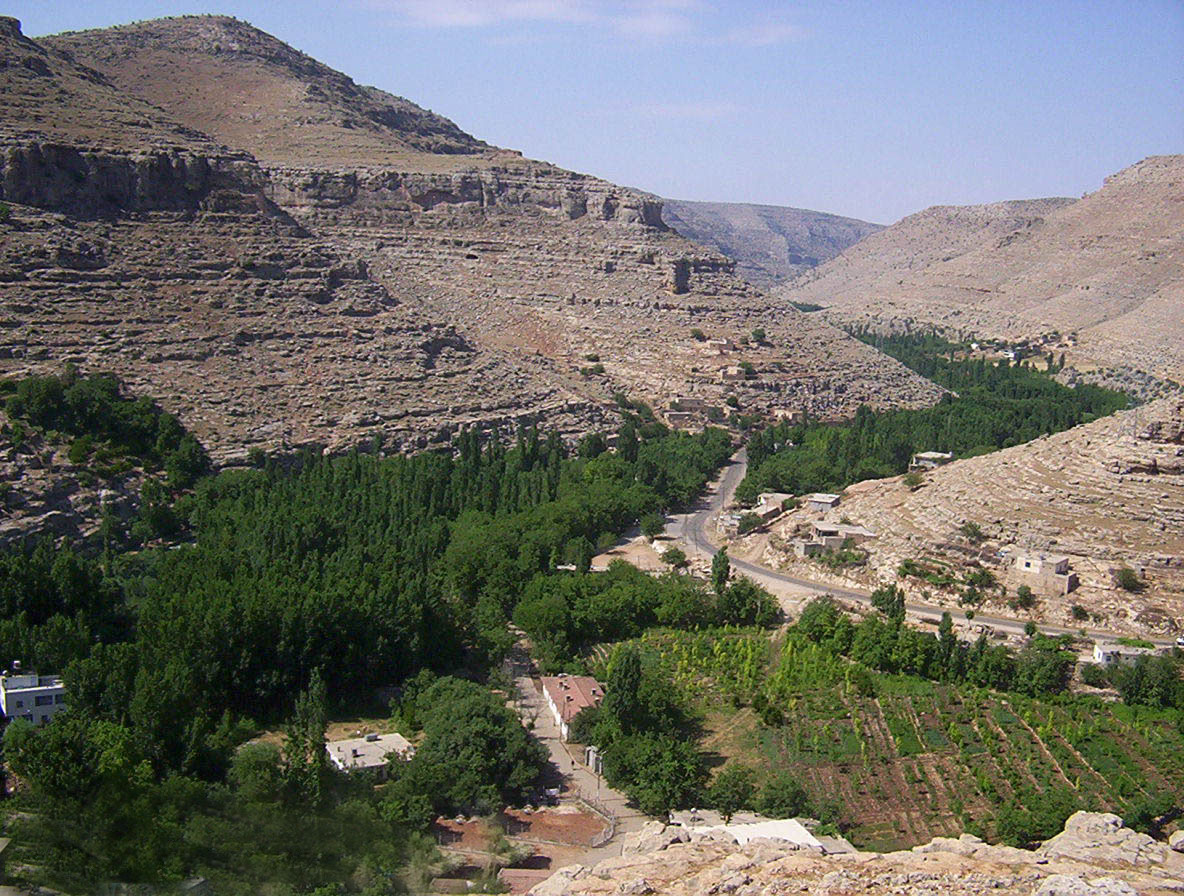 Beyaz Su - Vadi